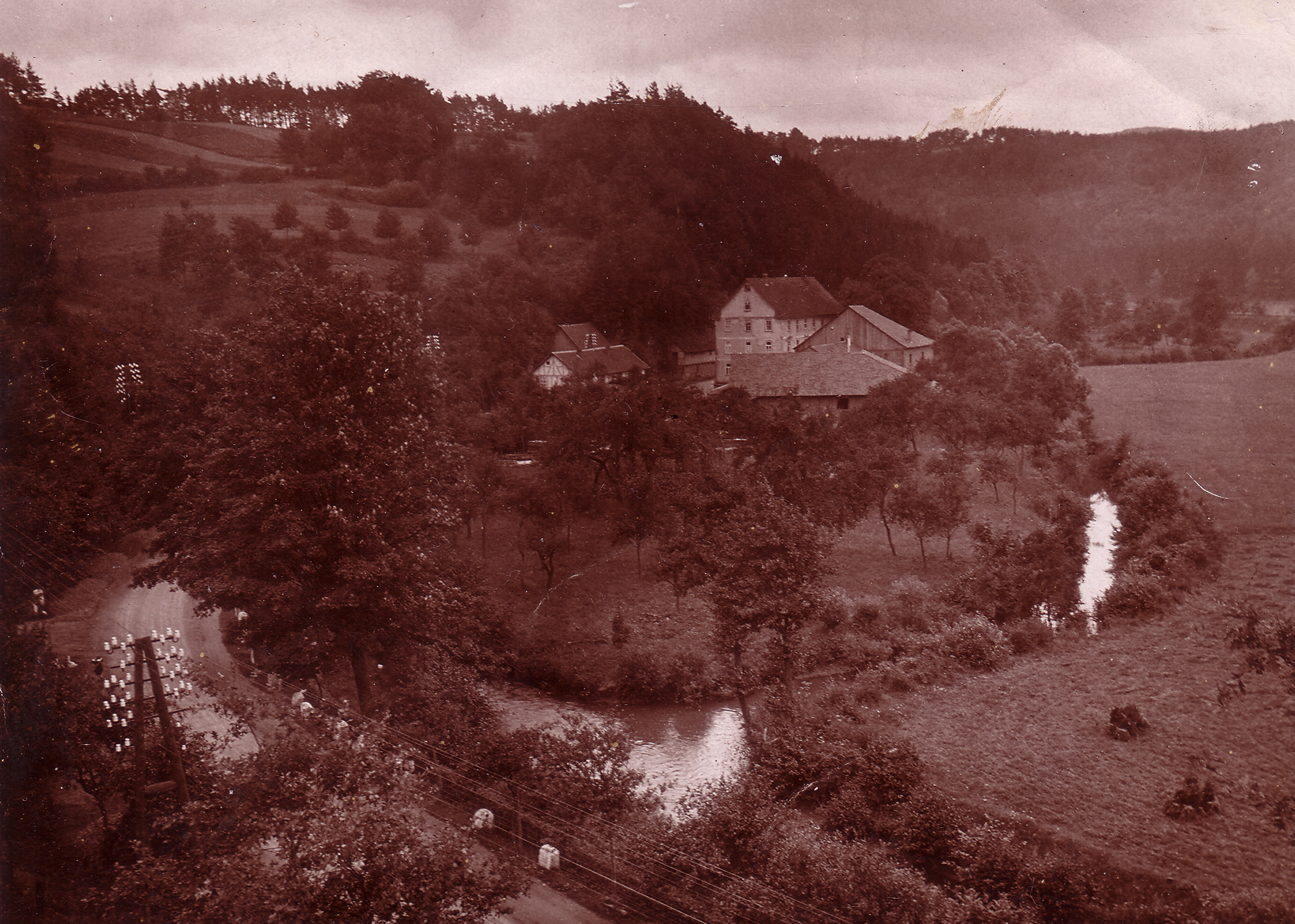 Wiesenmühle vor dem Neubau der Holzleistenfabrik (Blick vom Weinberg)